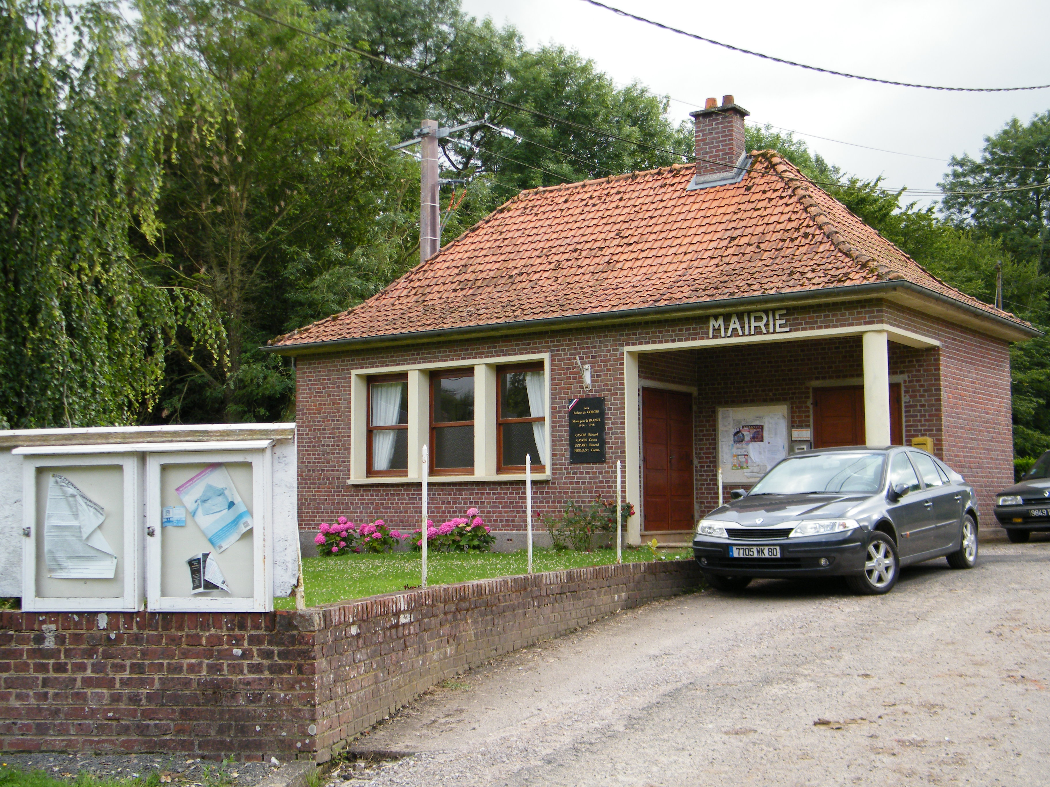 Mairie.